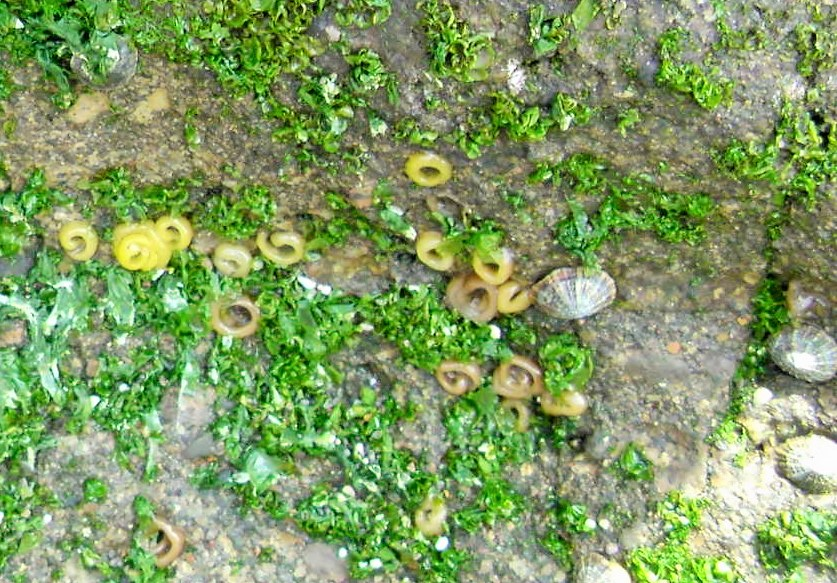 三浦半島和田 2015年 5月